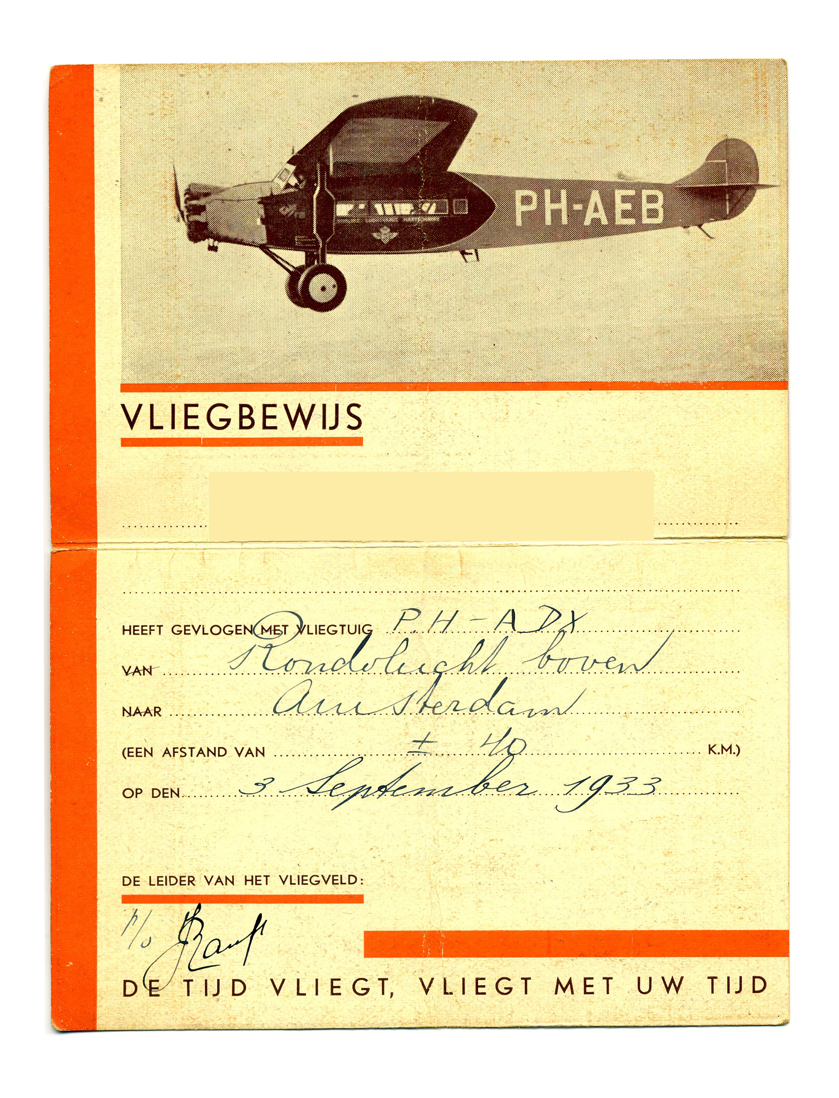 KLM vliegbewijs uit 1933. Rondvlucht boven Amsterdam, afstand ongeveer 40 km. Gevlogen met vliegtuig PH-ADX. Afbeelding van vliegtuig PH-AEB. Afmeting:12x16cm